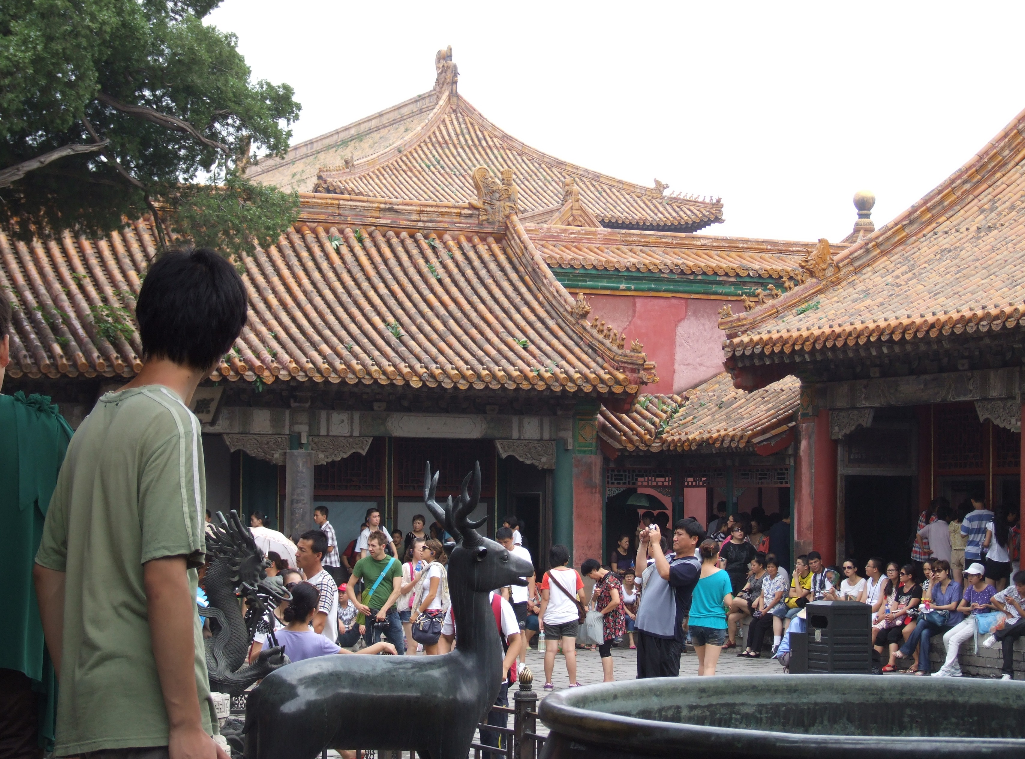 Verbotene Stadt